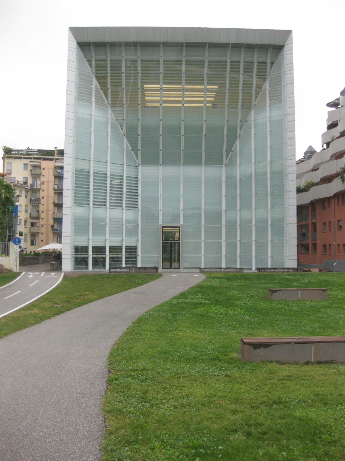 Museion (Bozen), Blick von der Talfer